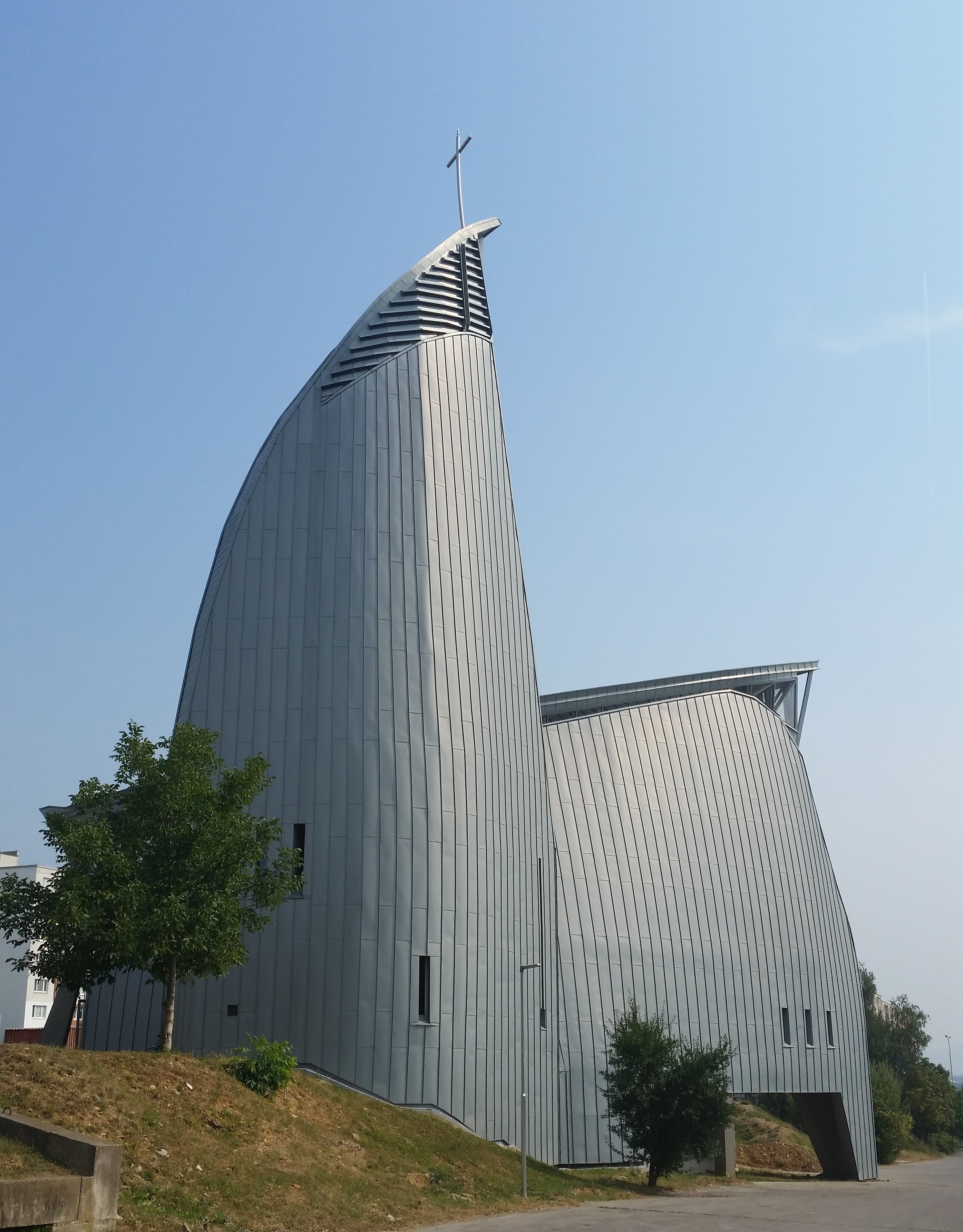 Kostol Božieho Milosrdenstva, Košice-Sídlisko KVP